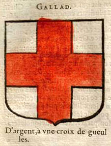 Gallad. Hierome de Bara